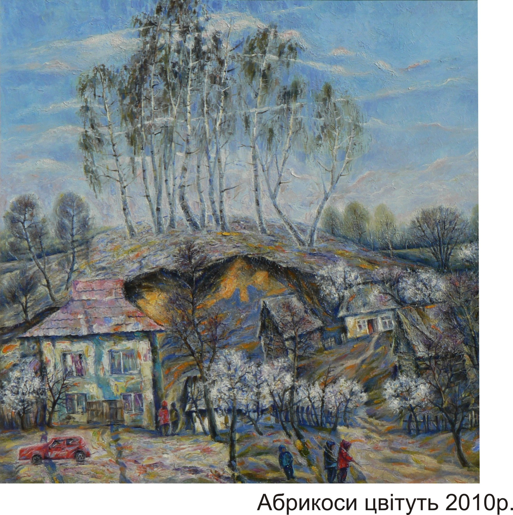 «Абрикоси цвітуть» (2002). Автор Мартиненко Анатолій Іванович